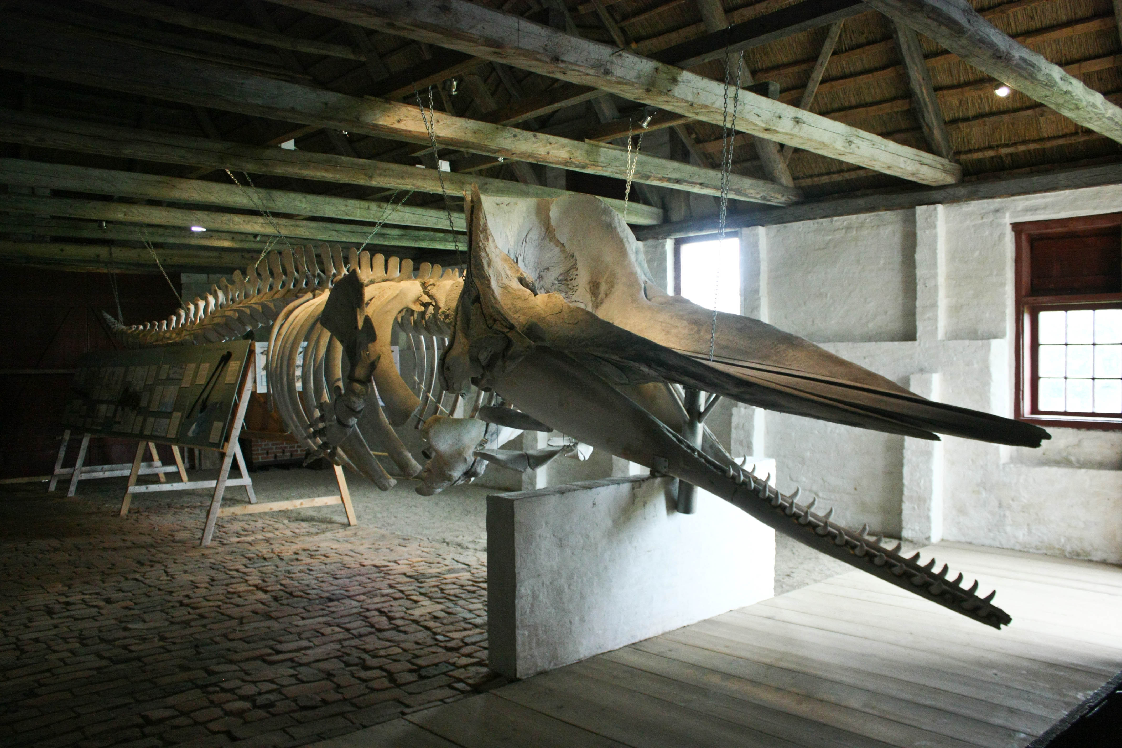 Kommandørgården auf RömöDansk: Kommandørgården på Rømø, Stuehuset og de dermed sammenbyggede to udlænger (stuehus 1770, lade og stald 1744, ladens og staldens vestender nye). F. 1950.